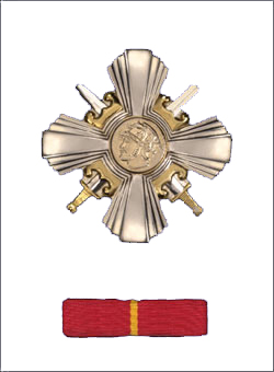 Srpski (latinica): Orden Milosa Obilica